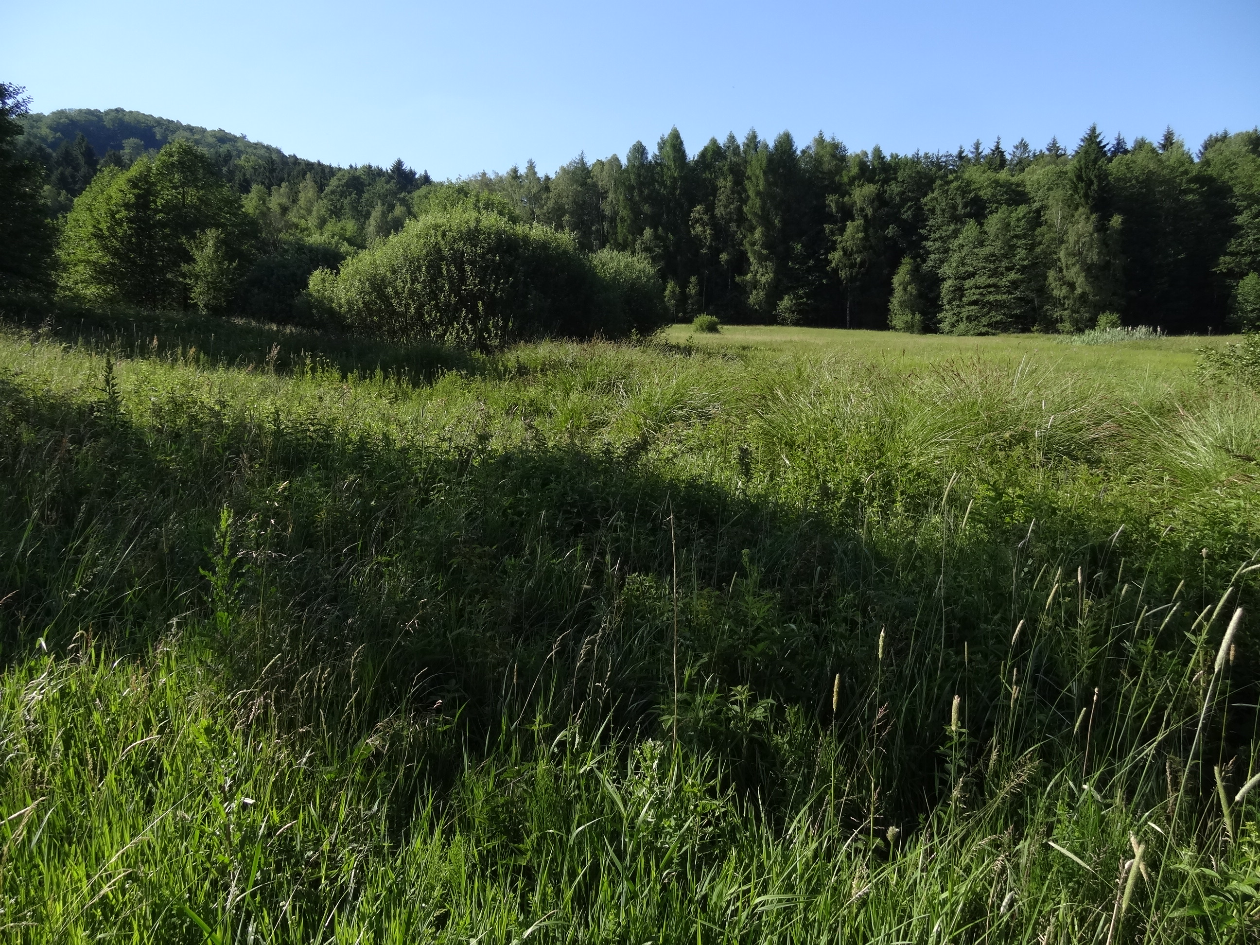 PR Marschnerova louka u Dolní Chřibské chrání jedinečnou mokřadní lokalitu s výskytem vzácných druhů rostlin, zejména z čeledi vstavačovité.